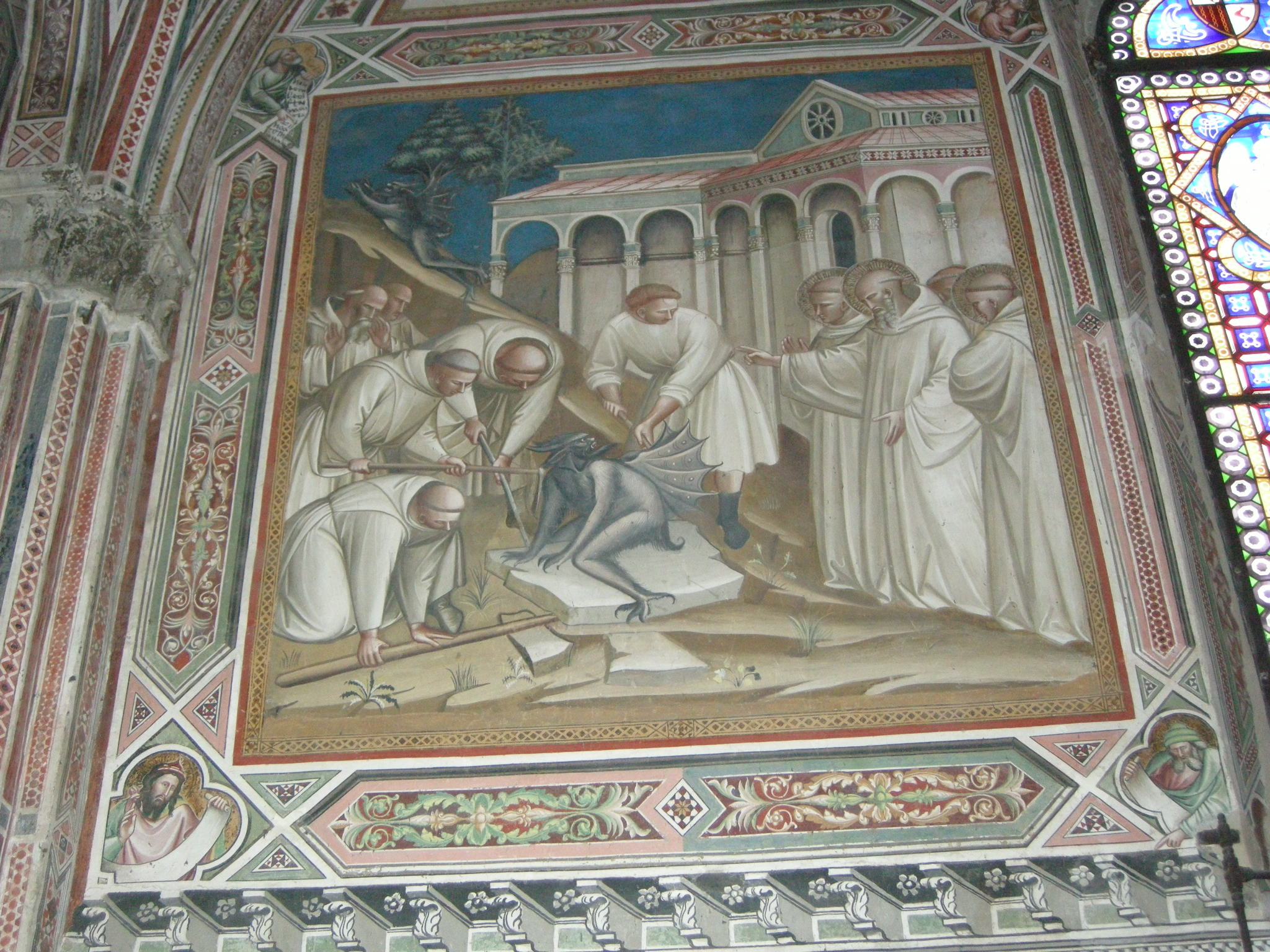 Spinello aretino, storie di san benedetto, episodio 13, Benedetto scaccia un demonio che impediva di sollevare le pietre per edificare Montecassino